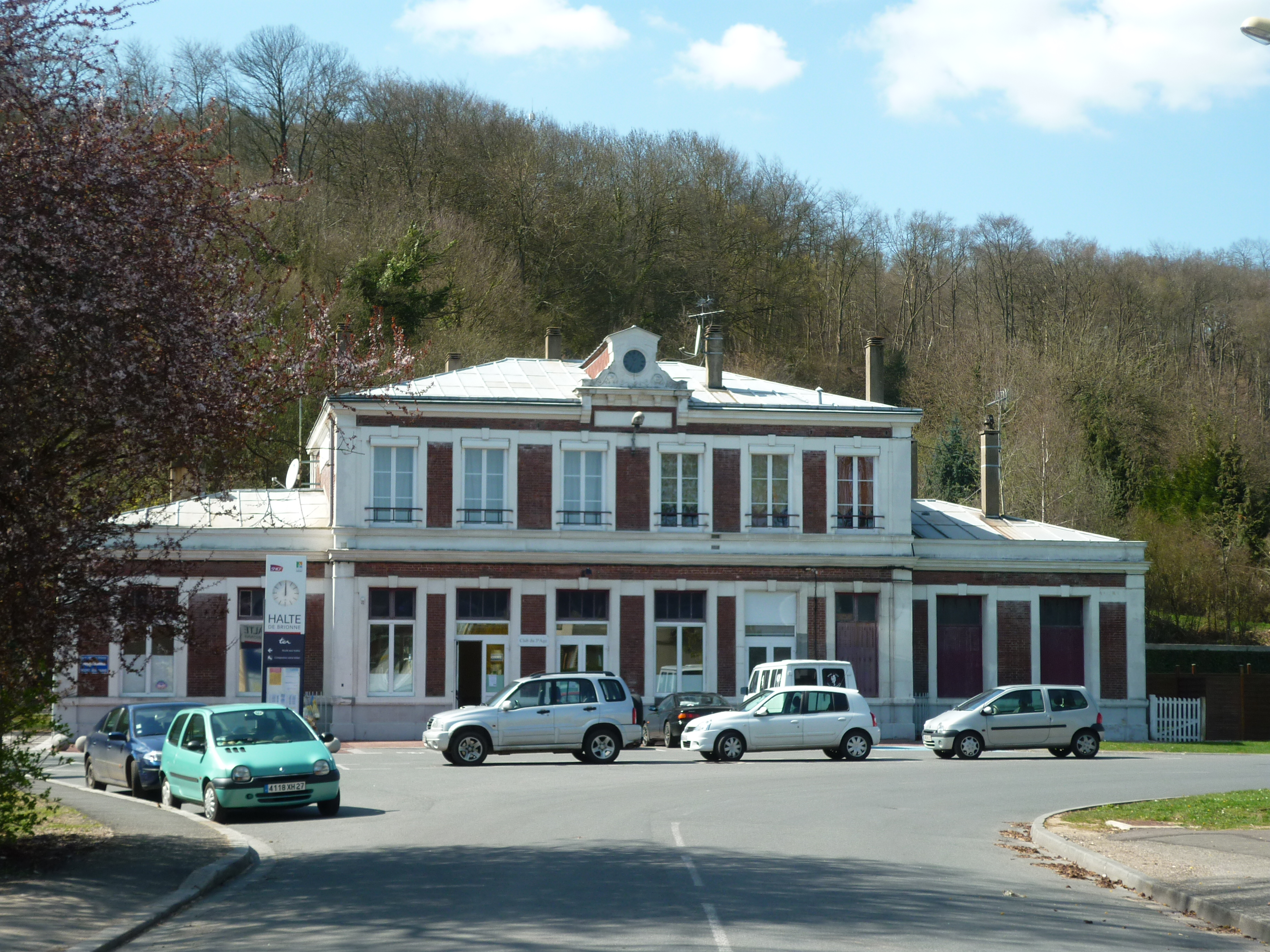 Bâtiment voyageurs de la gare de Brionne